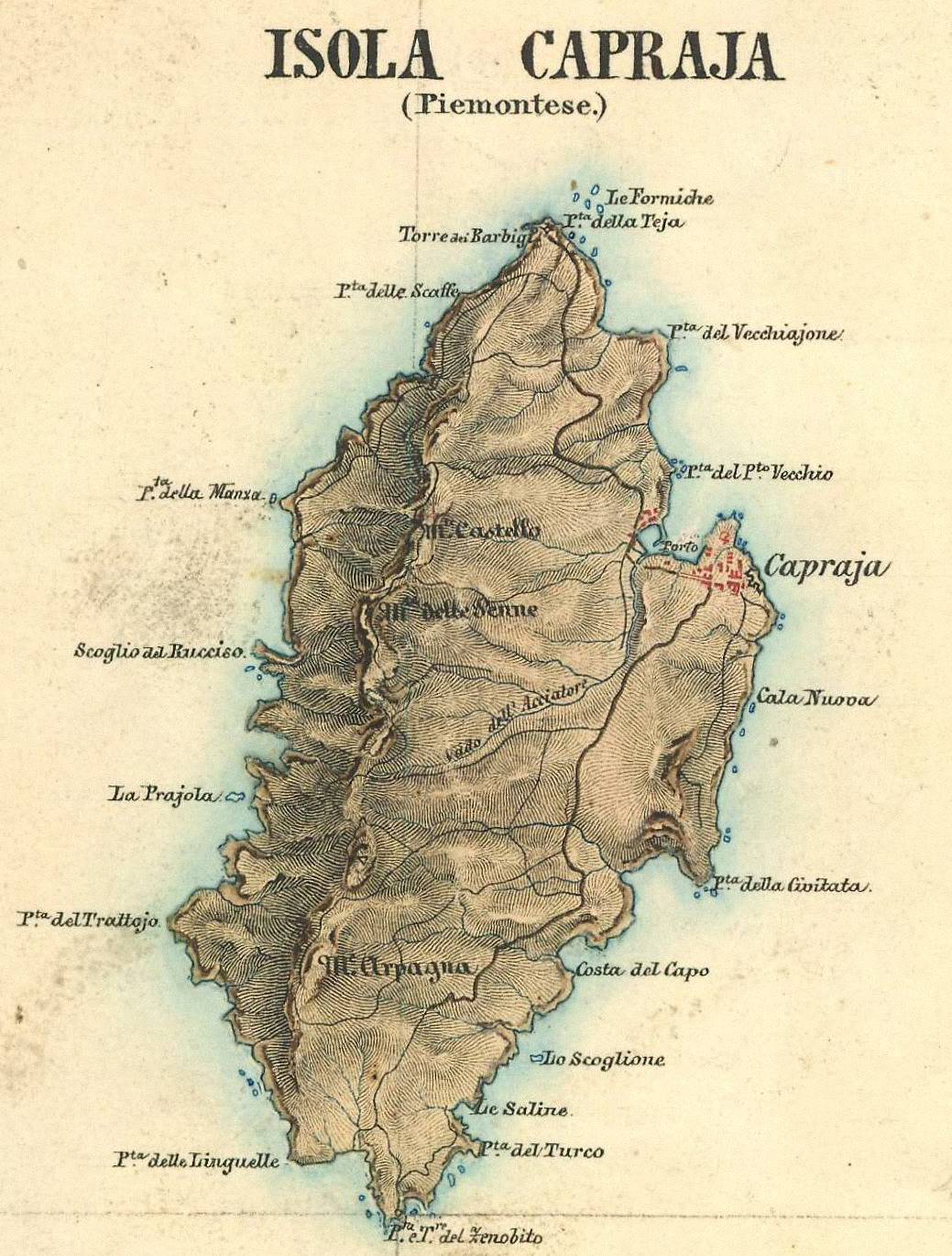 Karte der italienischen Insel Capraia im Jahr 1842 Ausschnitt aus der Originalaufnahme vom Kirchenstaate und von Toskana, 1841 – 1843